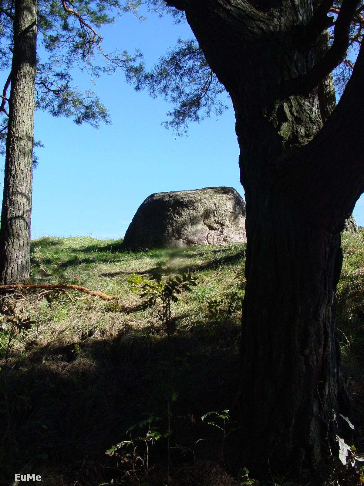 Głaz narzutowy "DIABELSKI KAMIEŃ" - dawny ołtarz ofiarny Galindów..